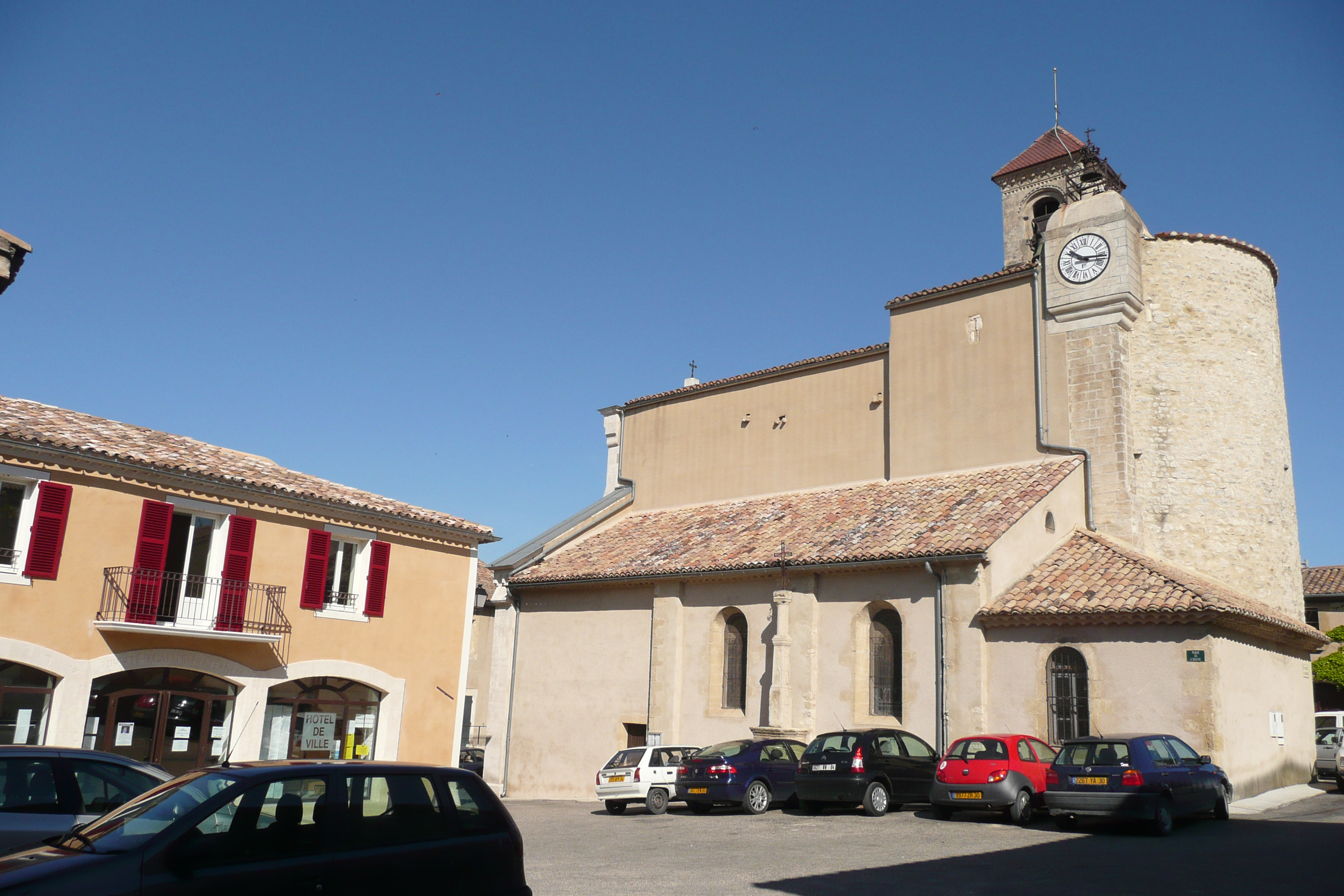 Hôtel de ville et église à Saint-Geniès-de-Comolas.